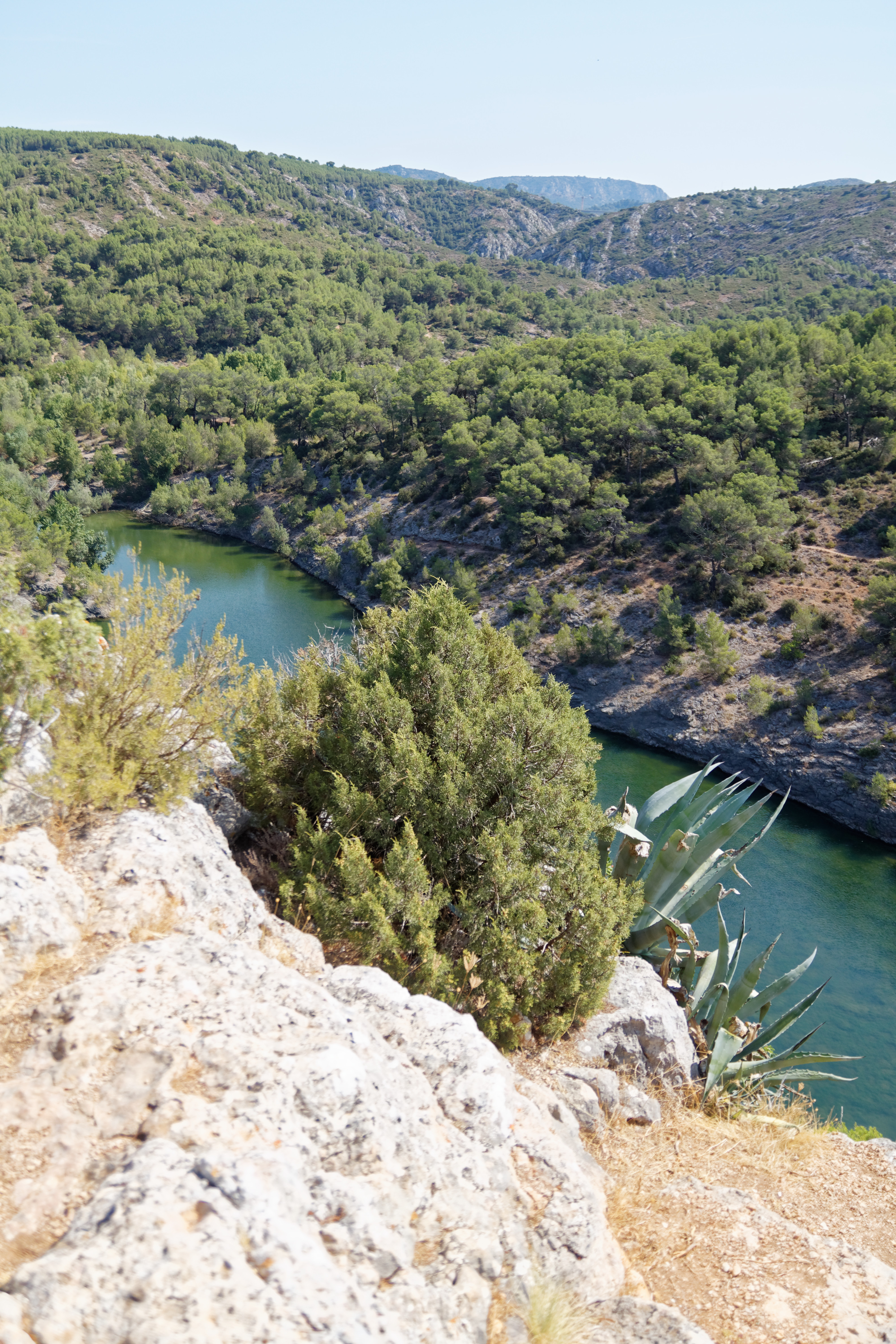 Zola-Talsperre in Le Tholonet